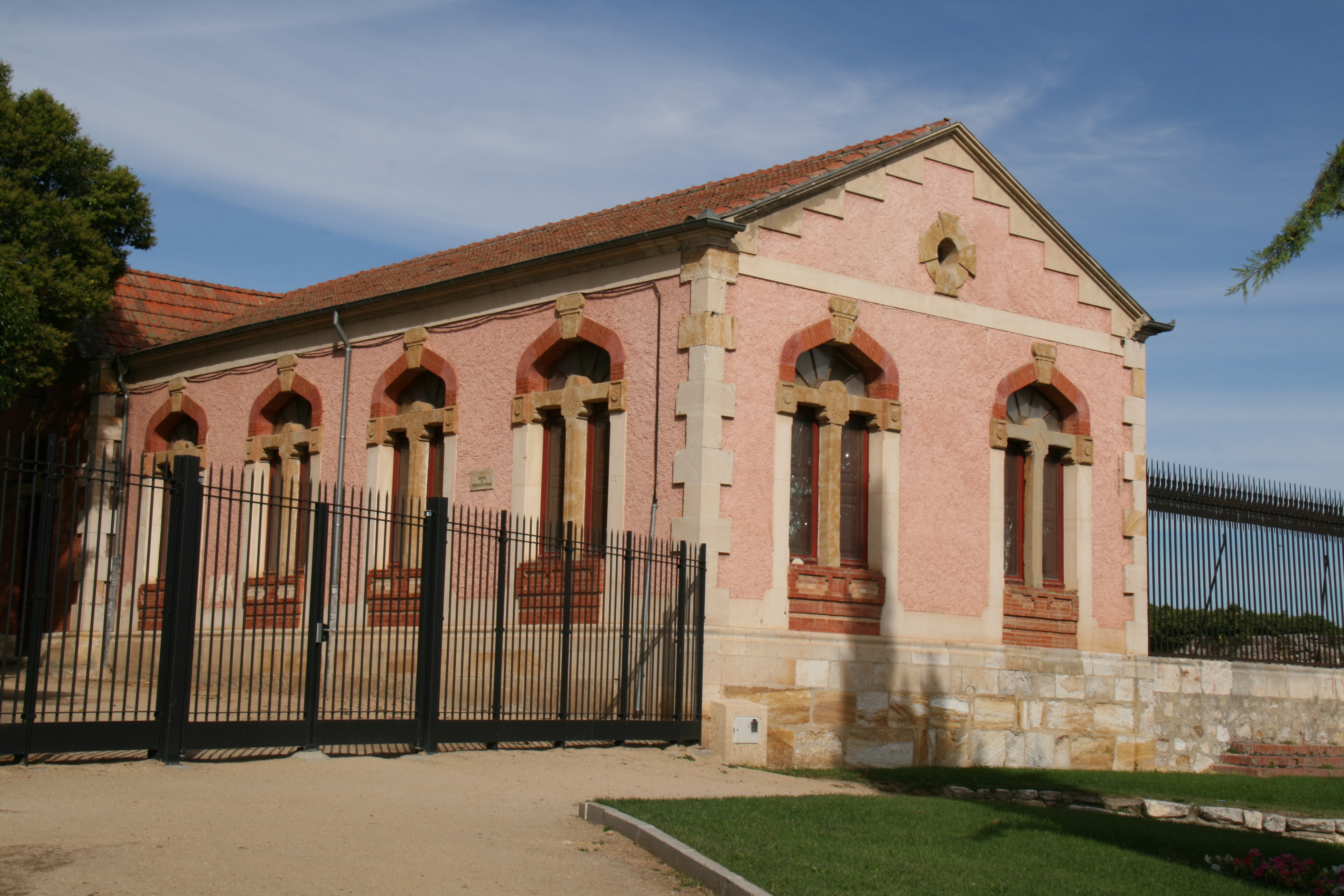 Laboratorio Municipal de Zamora de Francesc Ferriol i Carreras